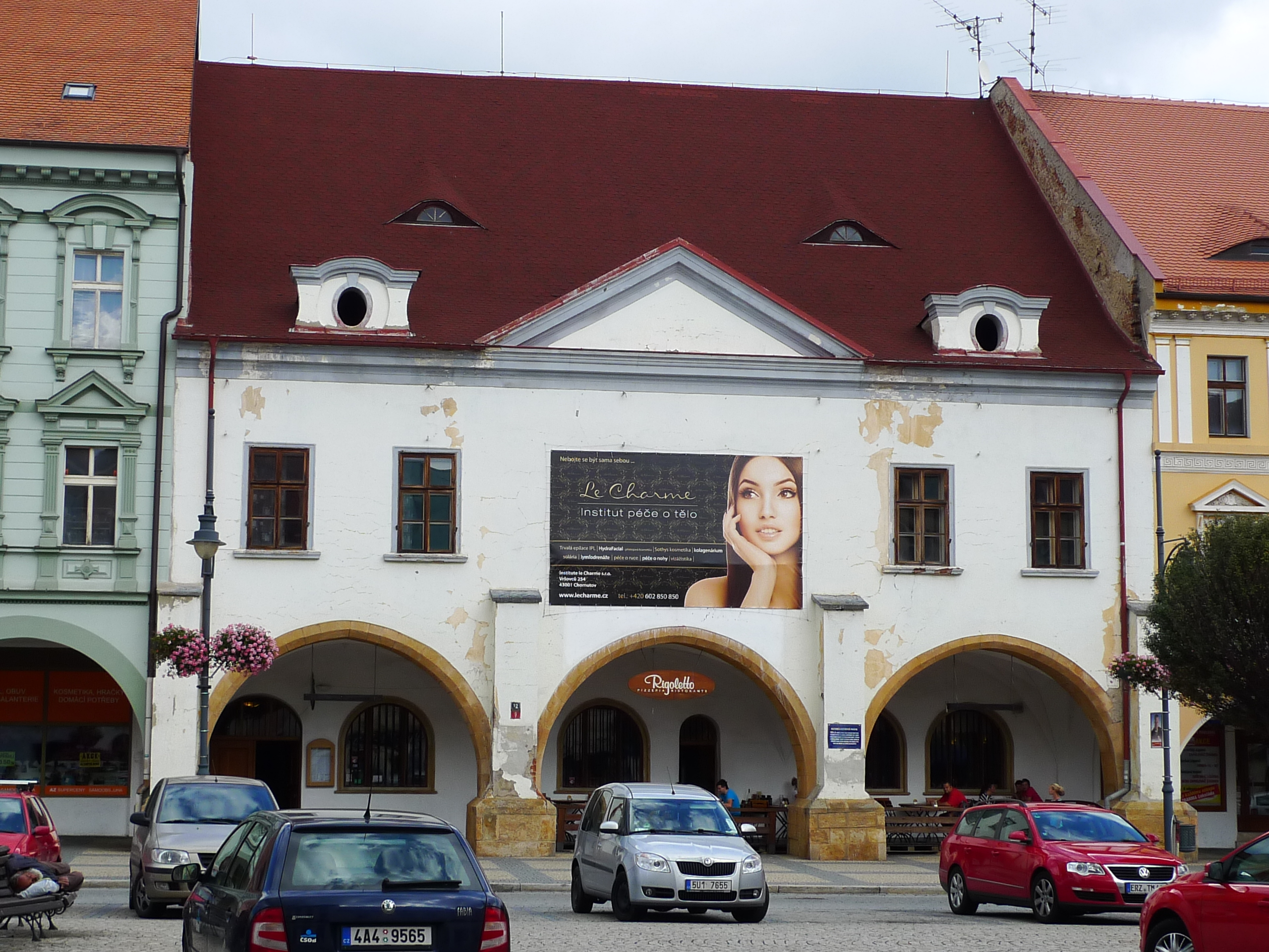 Měšťanský dům (Chomutov), 1. máje 9, Chomutov